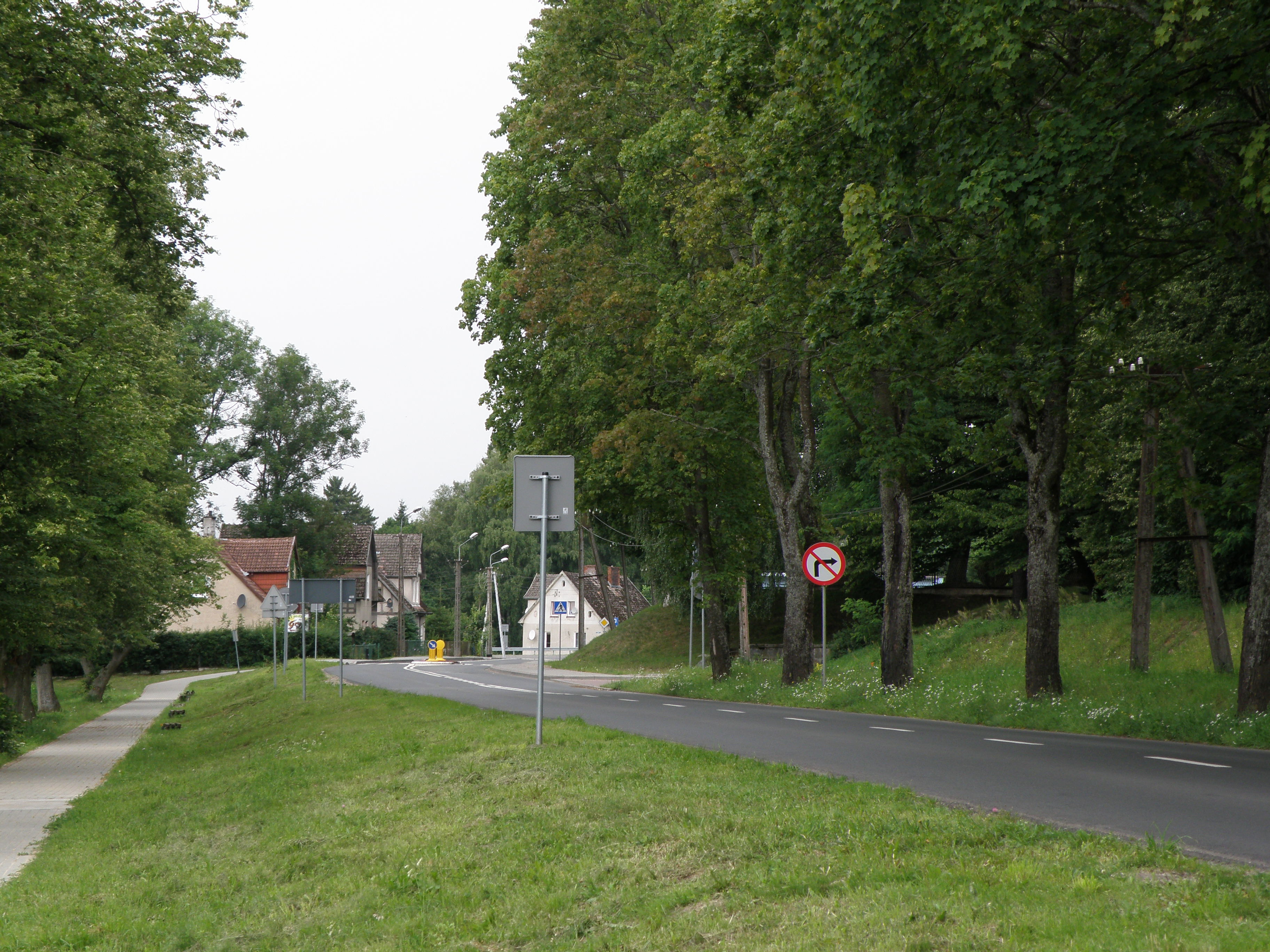 Polanów, woj. zachodniopomorskie, pow. koszaliński, gmina Polanów, ul. Wolności, droga wojewódzka nr 206 (DW206)